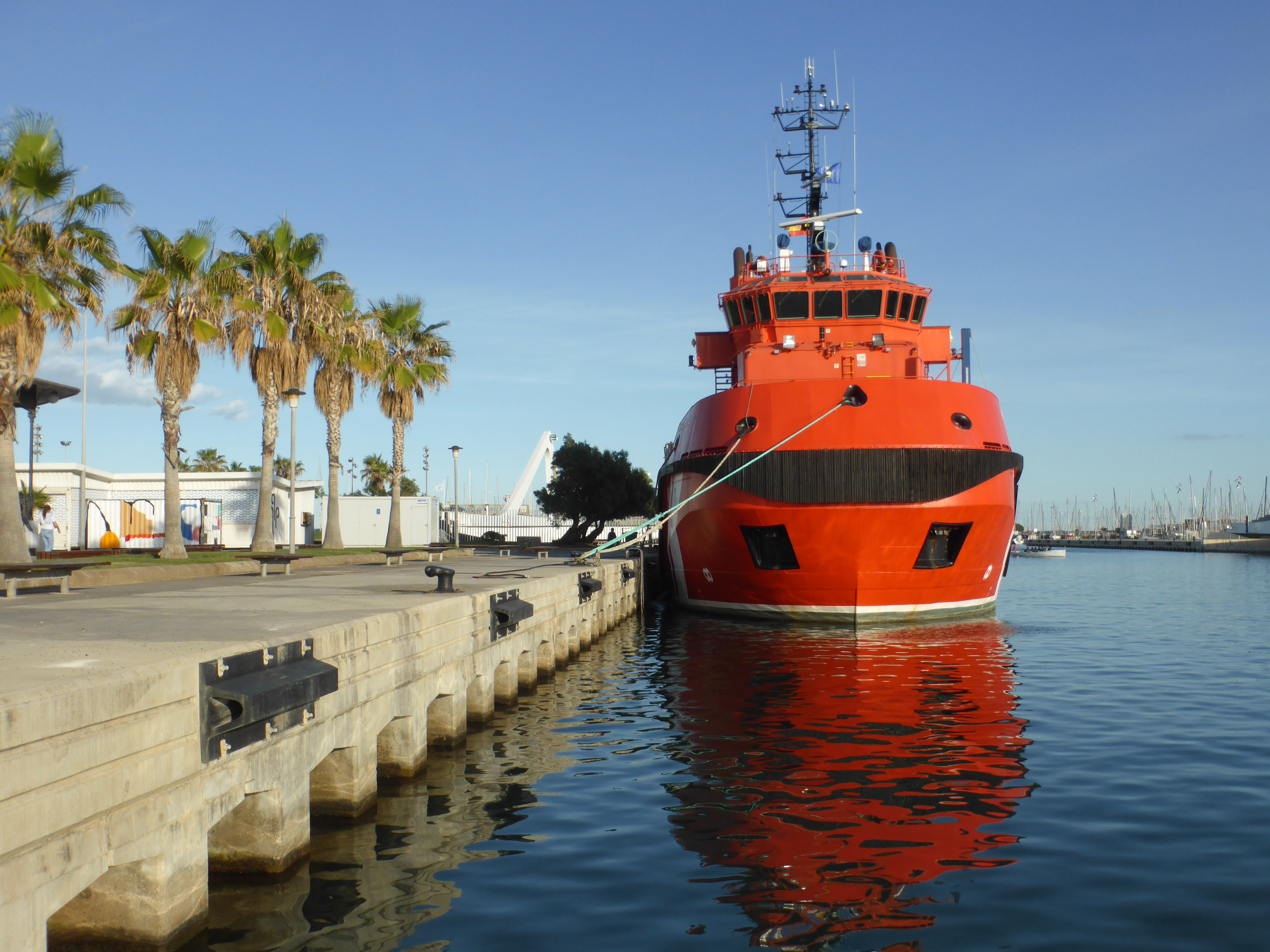 Vista de la proa del buque remolcador de Salvamento Marítimo (SM) "Marta Mata" (BS-33), construido en el año 2008, en Valencia, España. IMO 9429120.